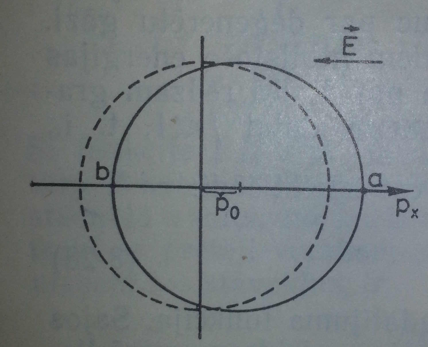 Fermī lode